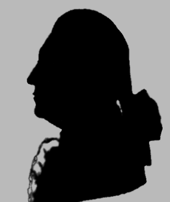 Силуэт